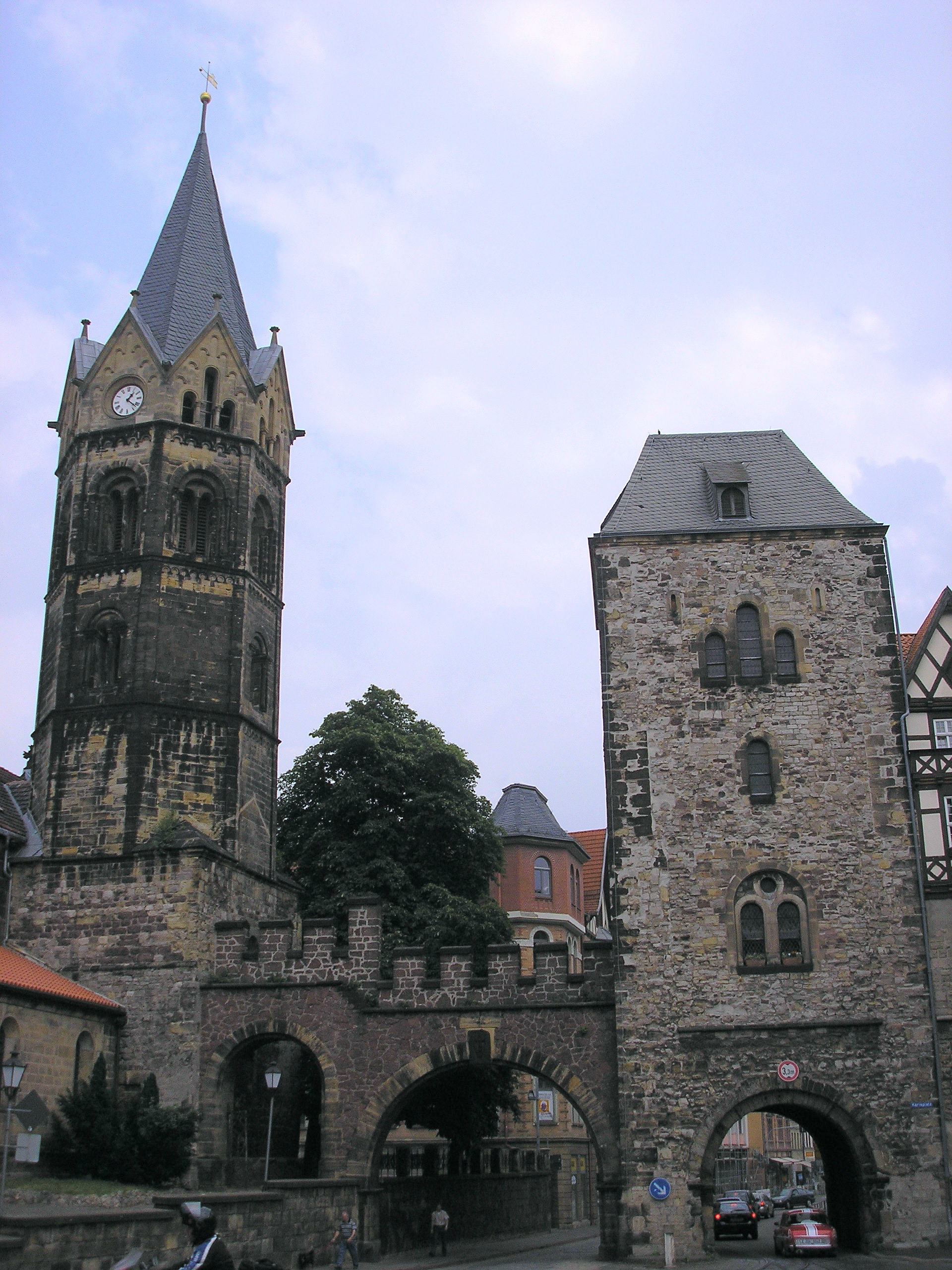 Nikolaiturm und Nikolaitor in Eisenach (Thüringen).